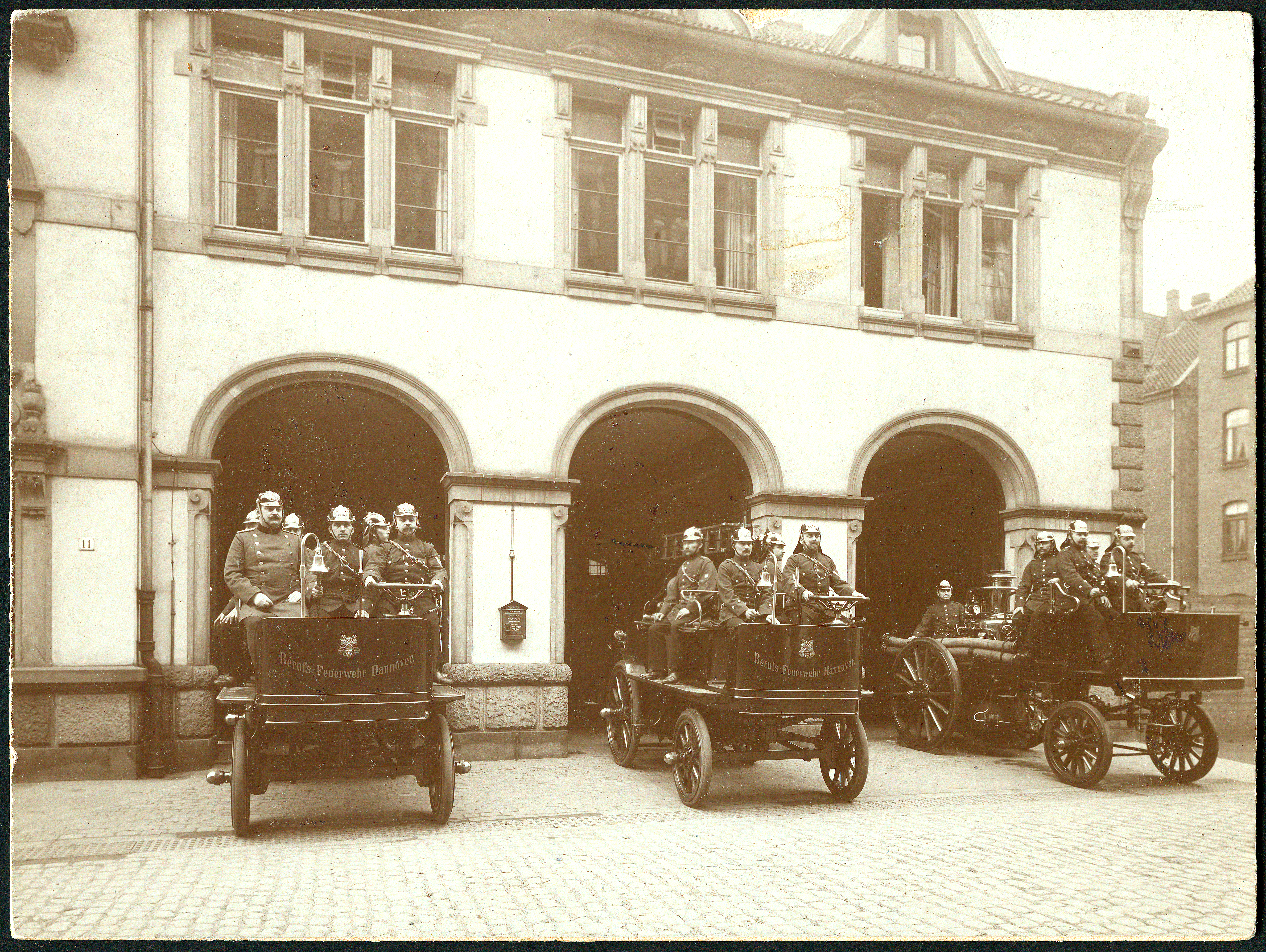 Der erste automobilie Feuerwehrlöschzug der Welt im Jahr 1902, hier vor der ursprünglich für Pferdekutschen geplanten Ausfahrt der "Feuerwache II, Unter der damaligen Adresse Am Kleinen Felde 11 (heute: Hausnummer 28) dokumentierte der Fotograf drei vollbesetzte Automobile mit der Aufschrift "Berufs-Feuerwehr Hannover. Das Revers dieser Ansicht trägt unter anderem eine Abschnitt des Stempelabdruckes des Polizeipräsidiums Hannover, Abteilung für Feuerwehr ... ...